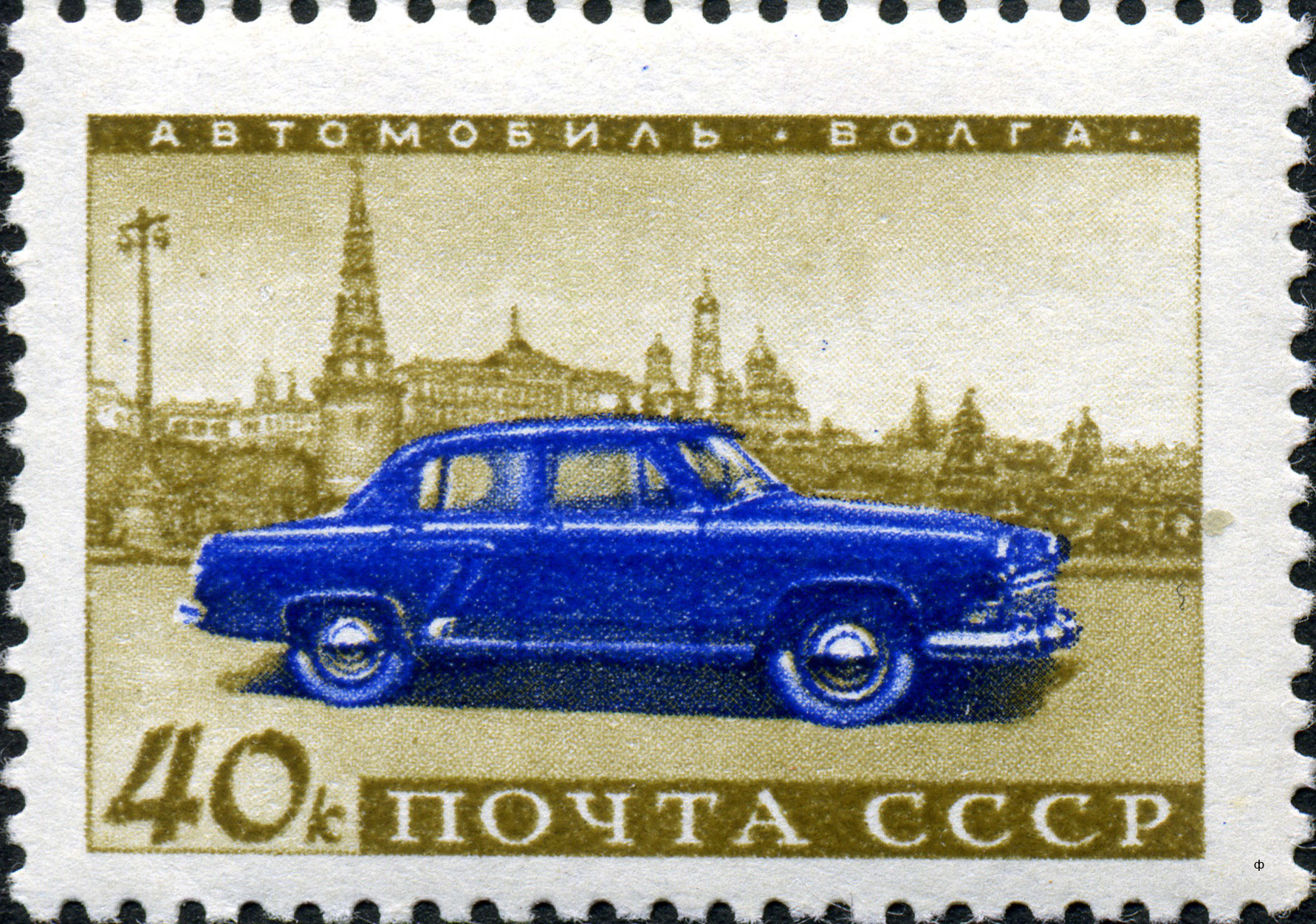 Марка СССР